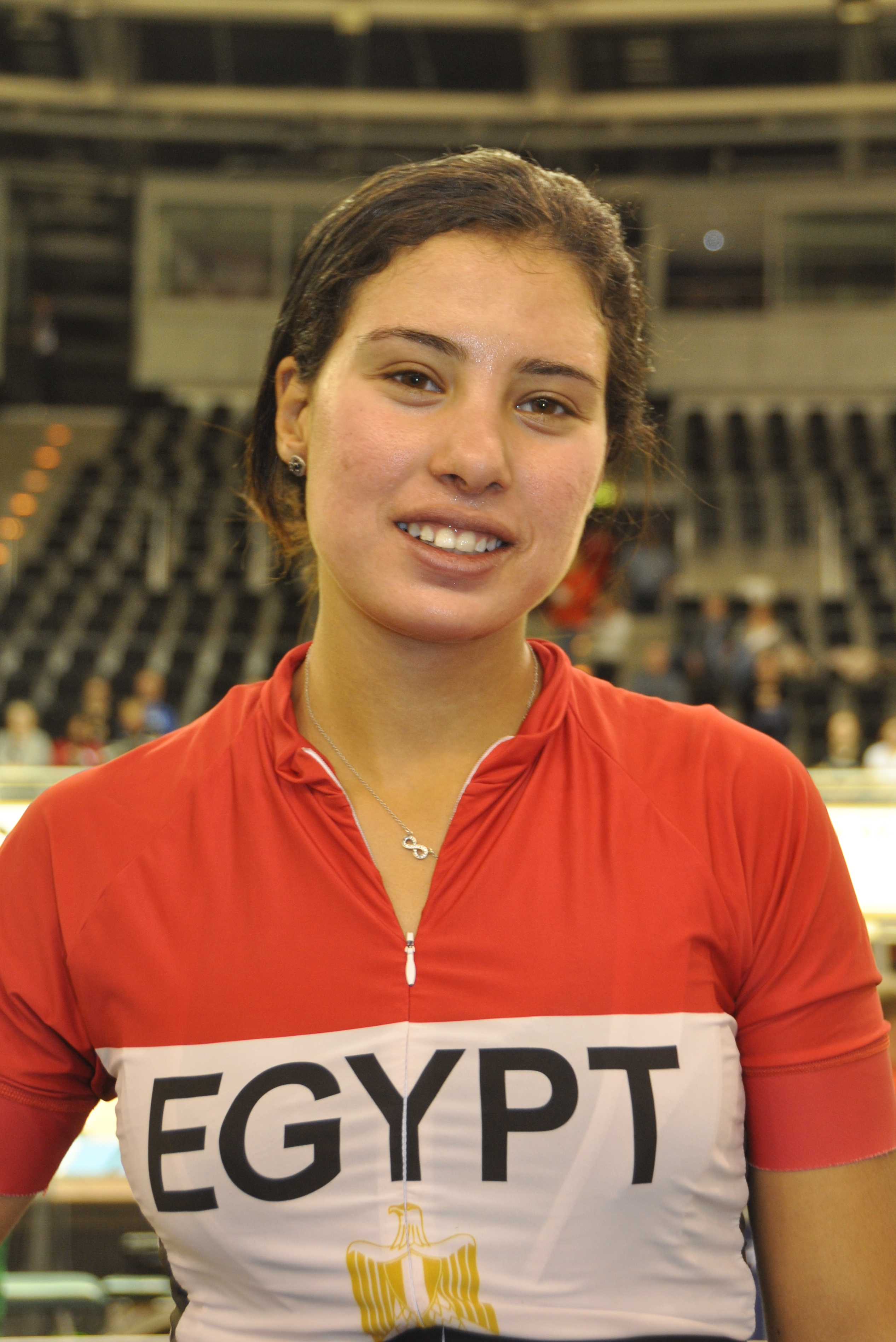 Ebtisam Zayed, ägyptische Radsportlerin